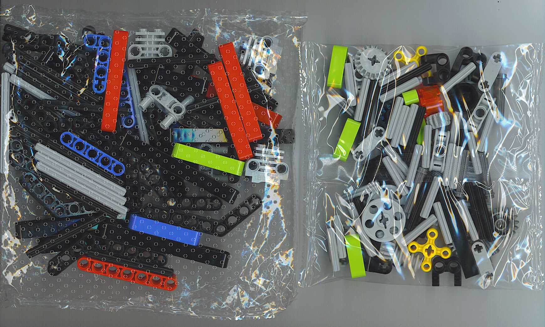 Lego Technic Bricks